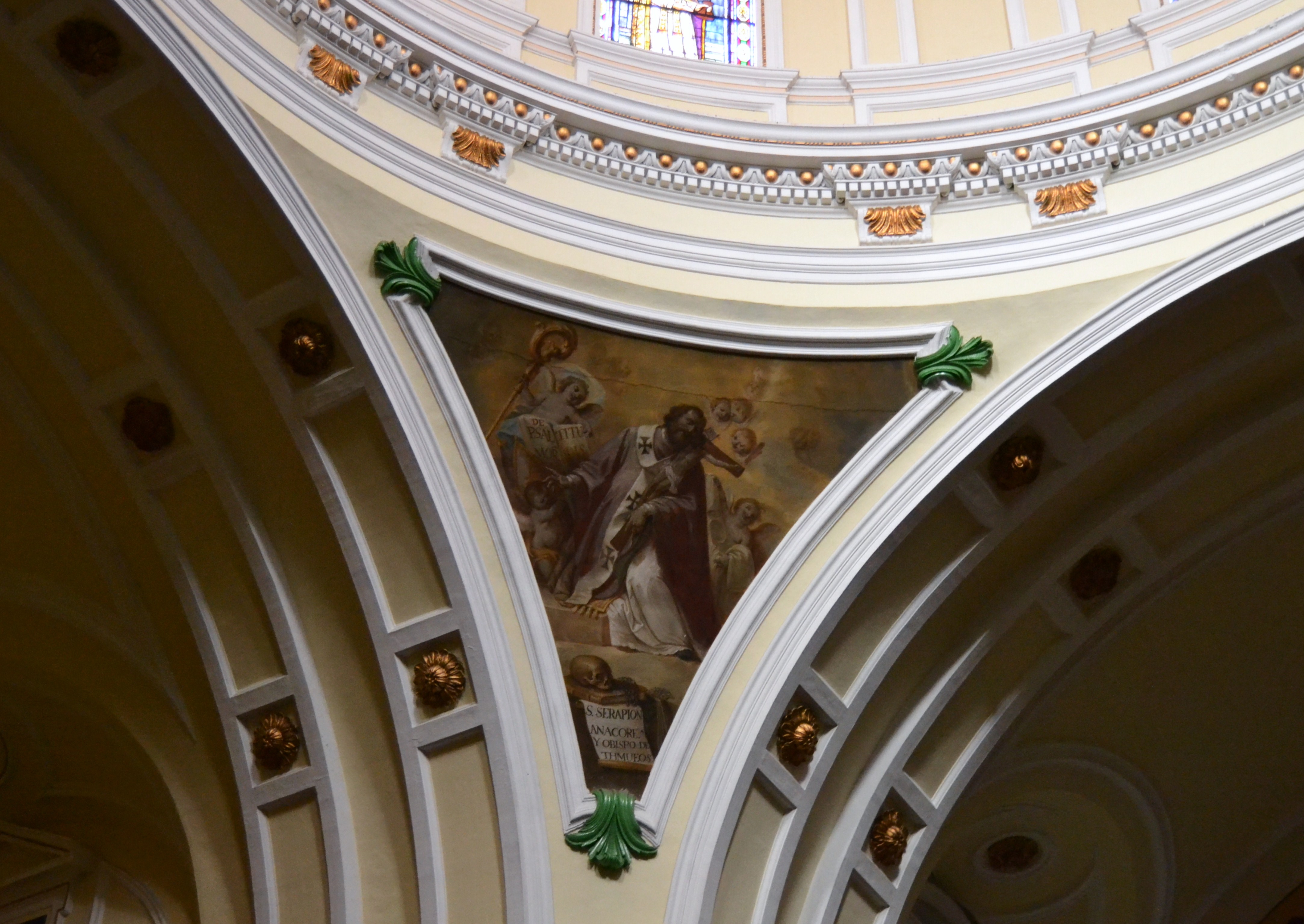 Petxina de la cúpula de l'església de sant Antoni Abat, València.